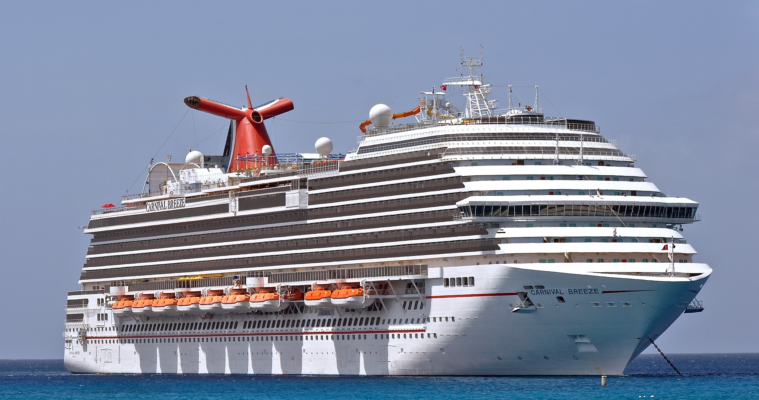 Die Carnival Breeze vor Anker bei Grand Cayman, Karibik